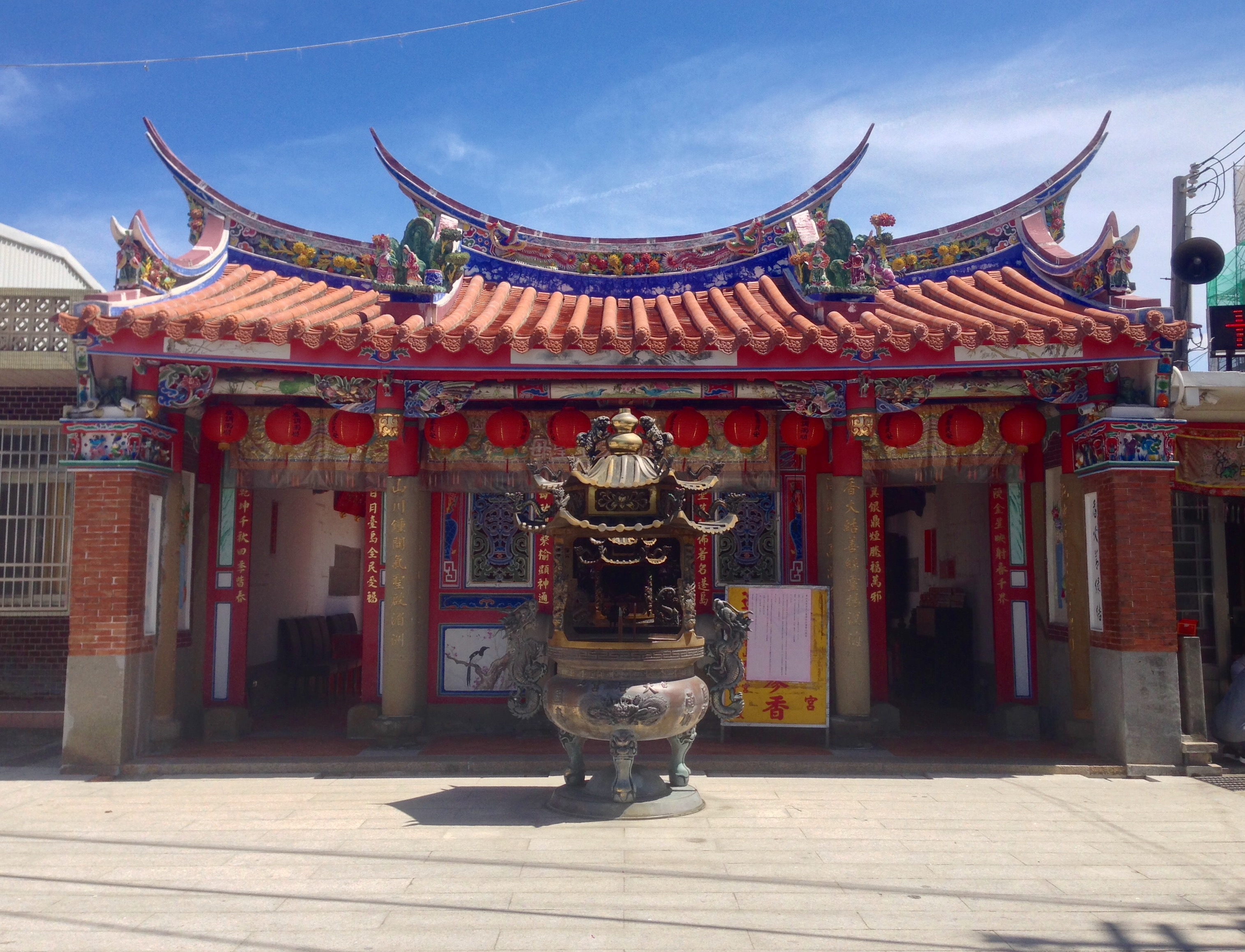 香山天后宮